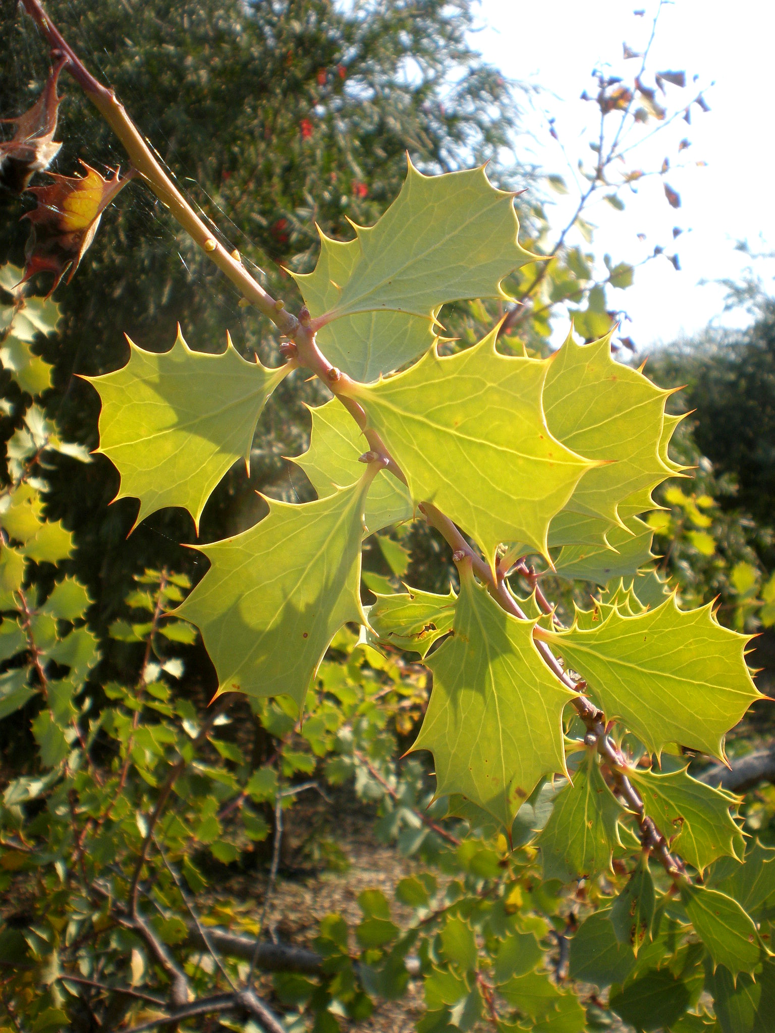 Jardín Botánico de Barcelona.